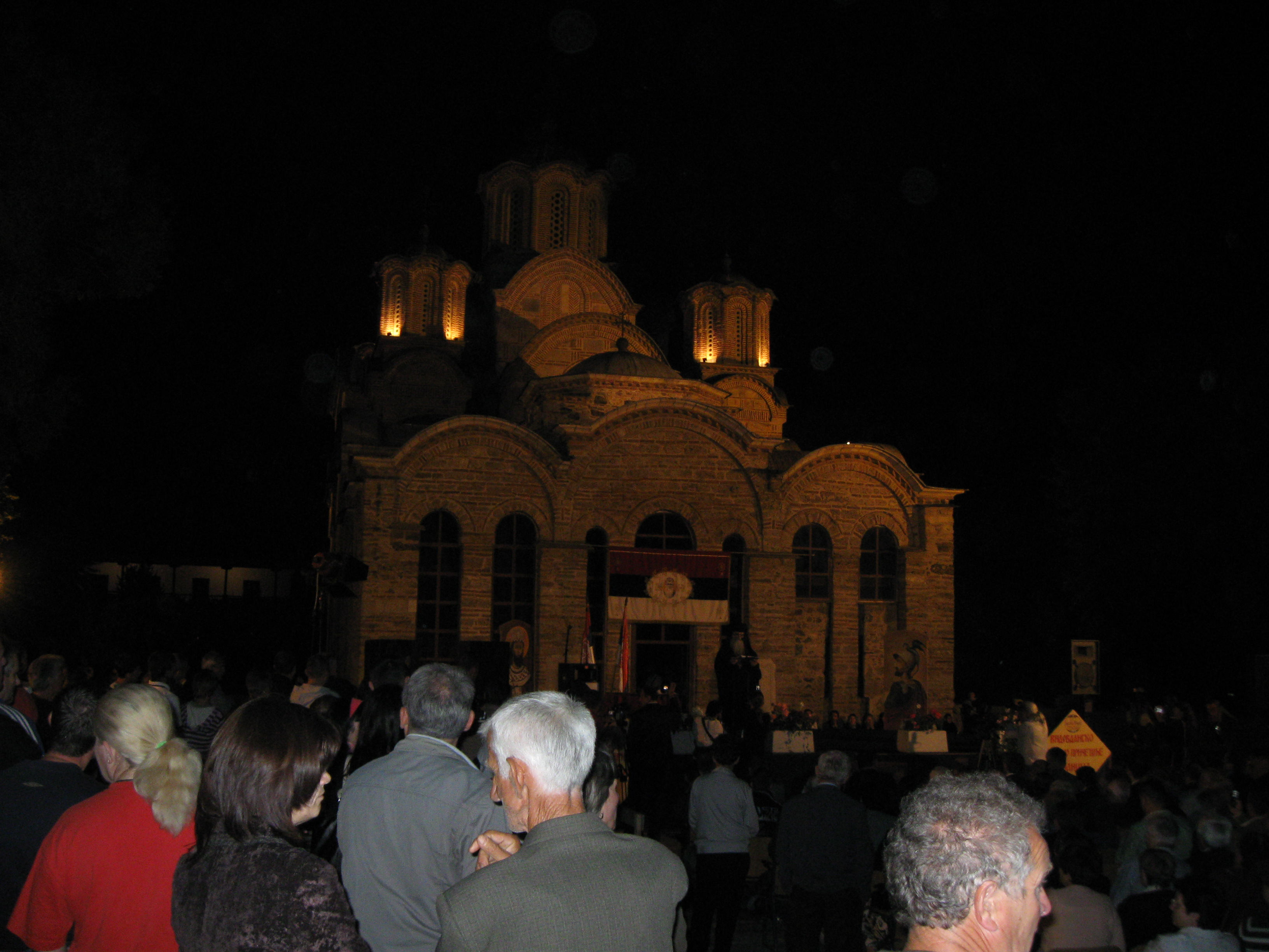 Vidovdansko pesničko pričešće